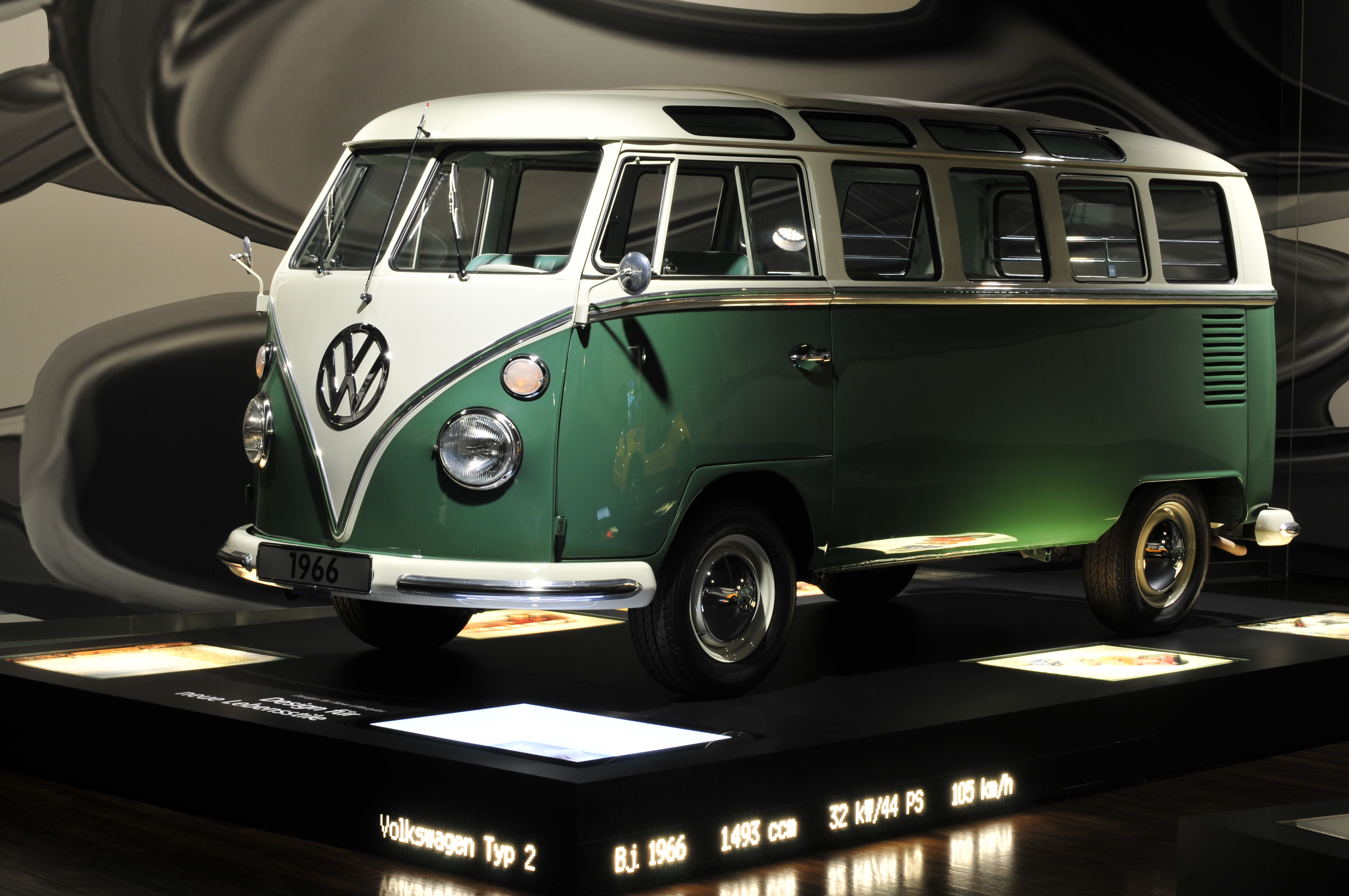 Autostadt Wolfsburg; Auto im Zeithaus